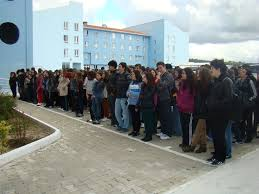 Çanakkale Fen Lisesi binası